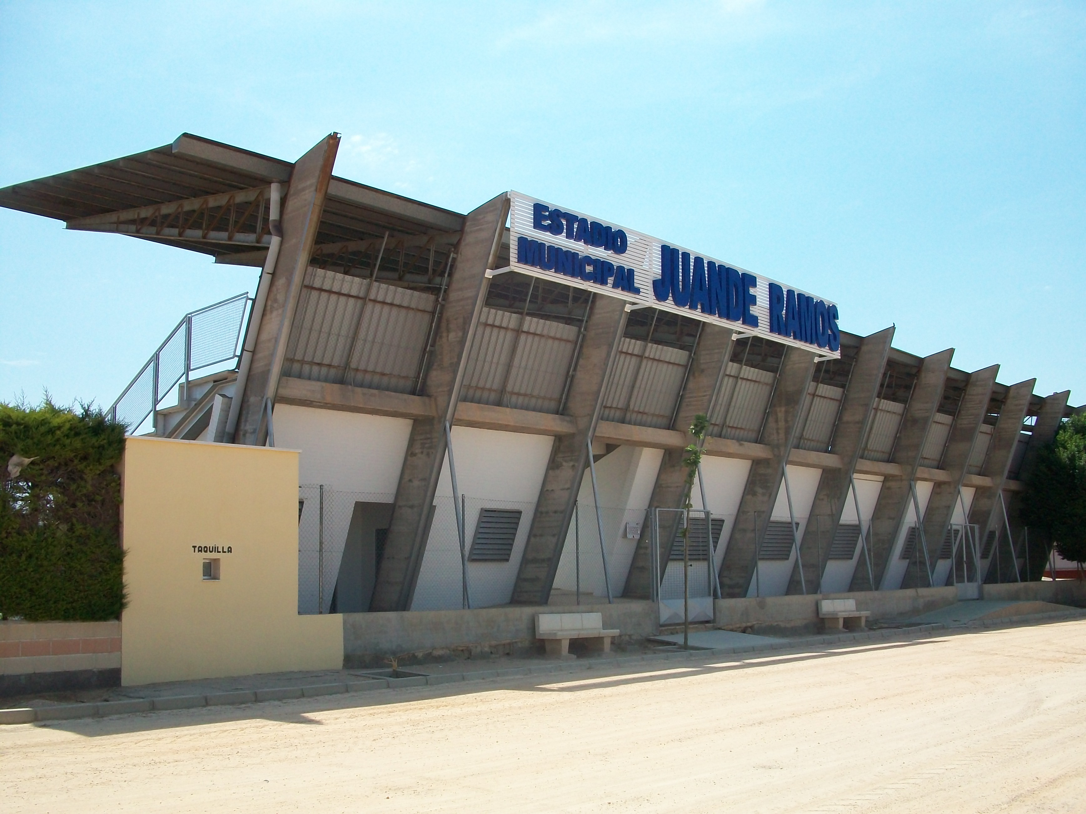 Estadio municipal Juan de Ramos en Pedro Muñoz.